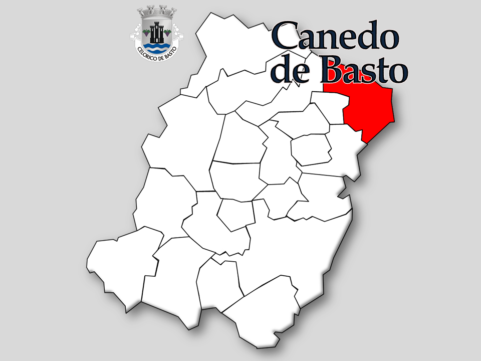 Censos 1864/2011